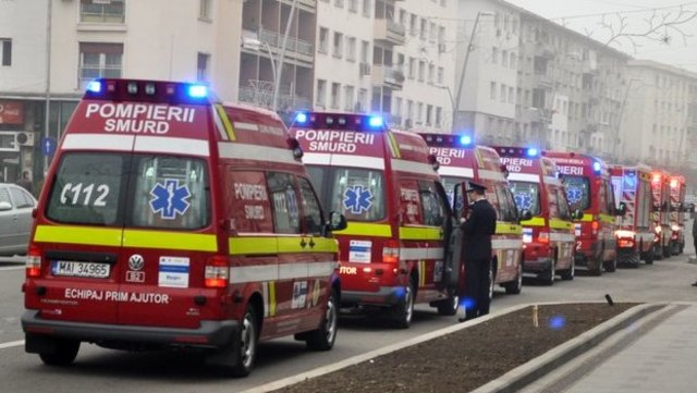 Smurd ambulances Romania